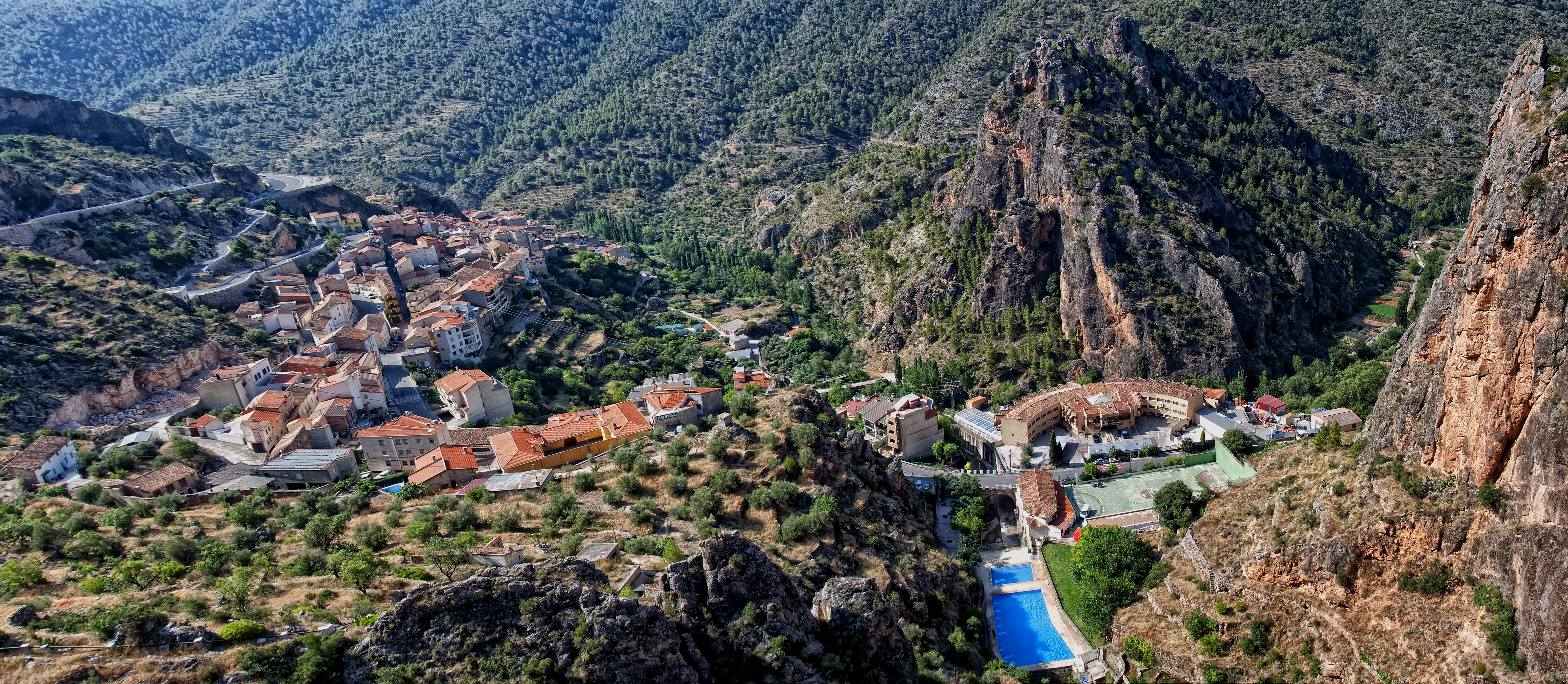 Sierra de Alcaraz y Segura y cañones del Segura y del Mundo This is a photography of a Special Area of Conservation in Spain with the ID: ES4210008. Natura2000 entry, EEA entry